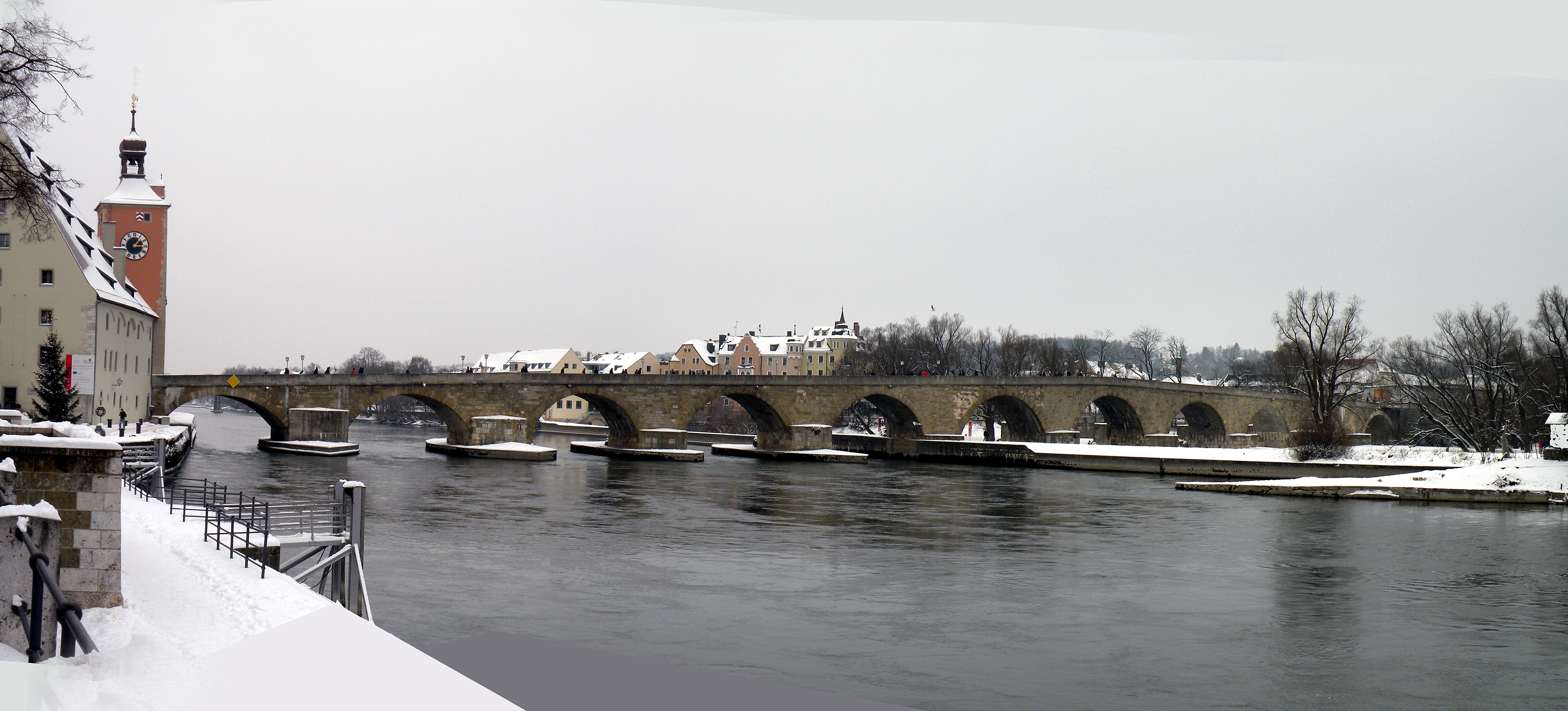 Каменный мост.